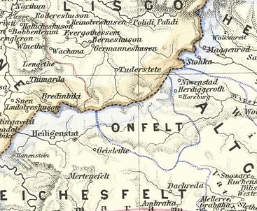 Deutschlands Gaue III: Sachsen, Nördliches Thüringen: Kartenauschnitt Ohmfeld